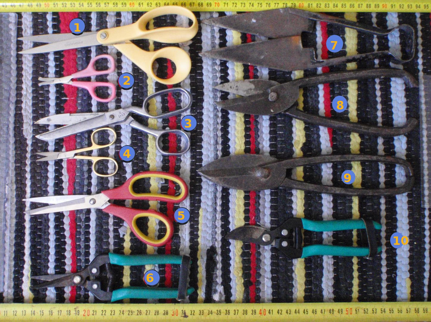 Valik kääre eesti kodus 2008 aasta suvel